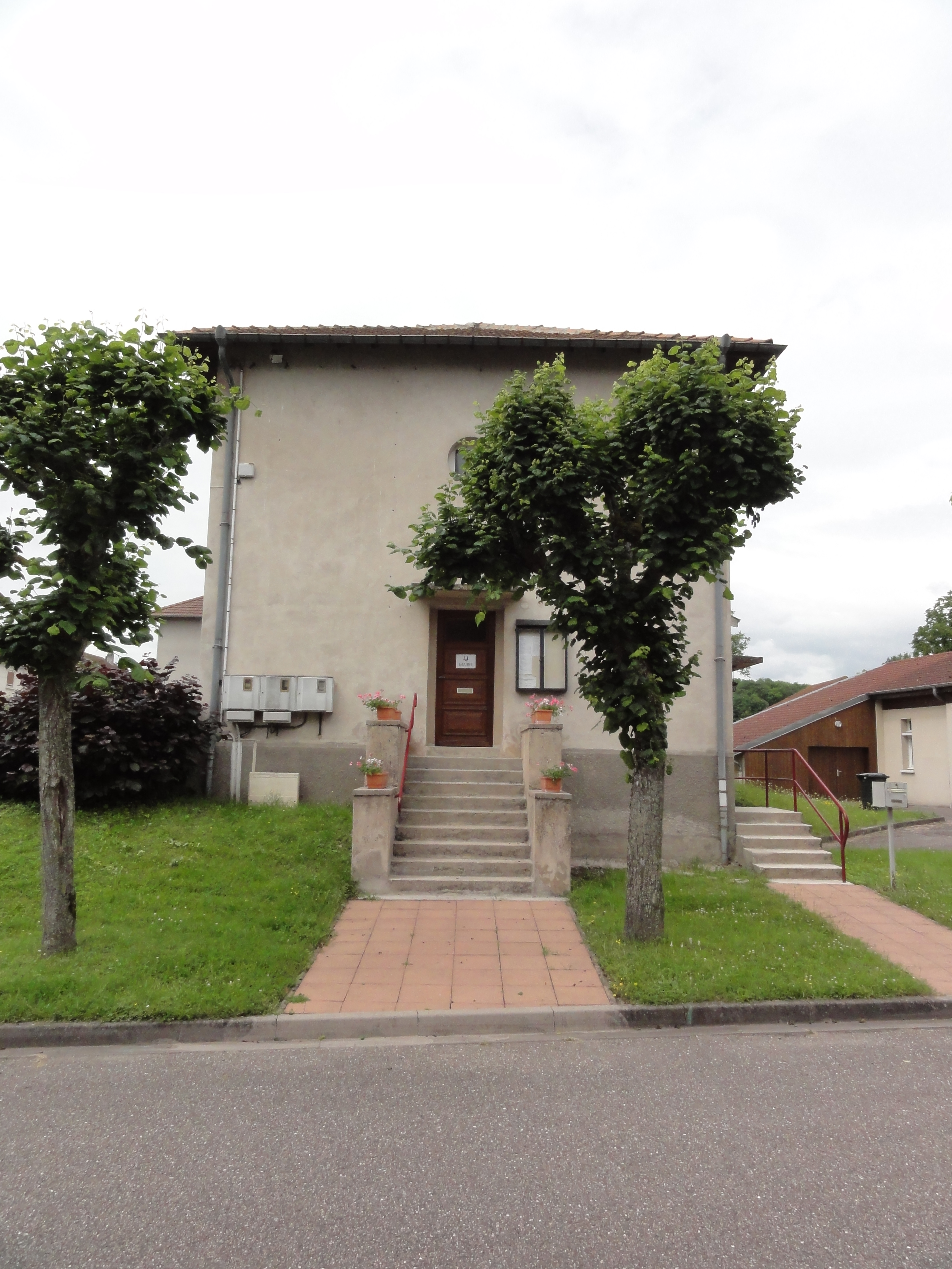 Xousse (M-et-M) mairie